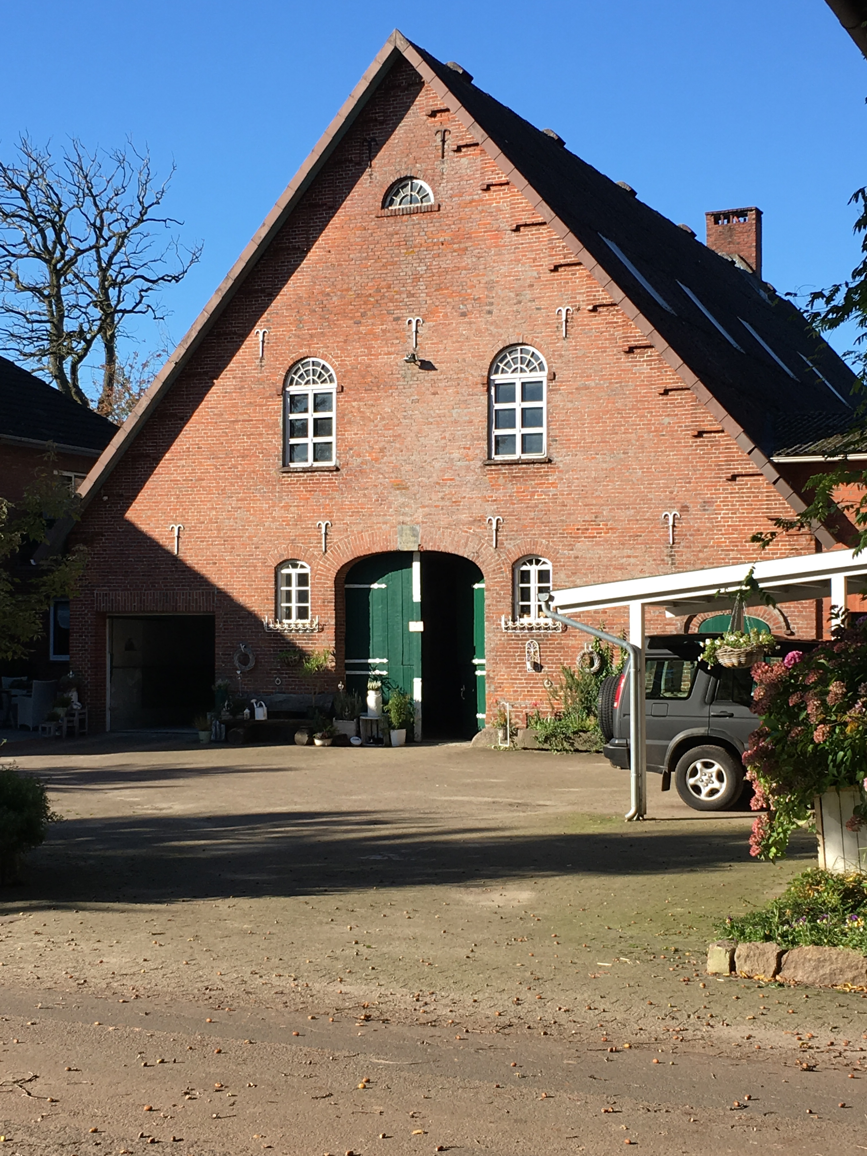 Ehmalig Buurnhuus in Alfst